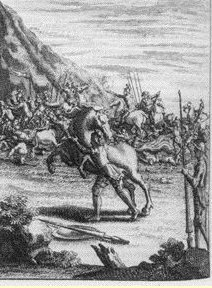 Illustyration du combat du cheval Bayard contre Rodomont dans le Roland Amoureux de Lesage paru en 1717. Conservé à la BNF.